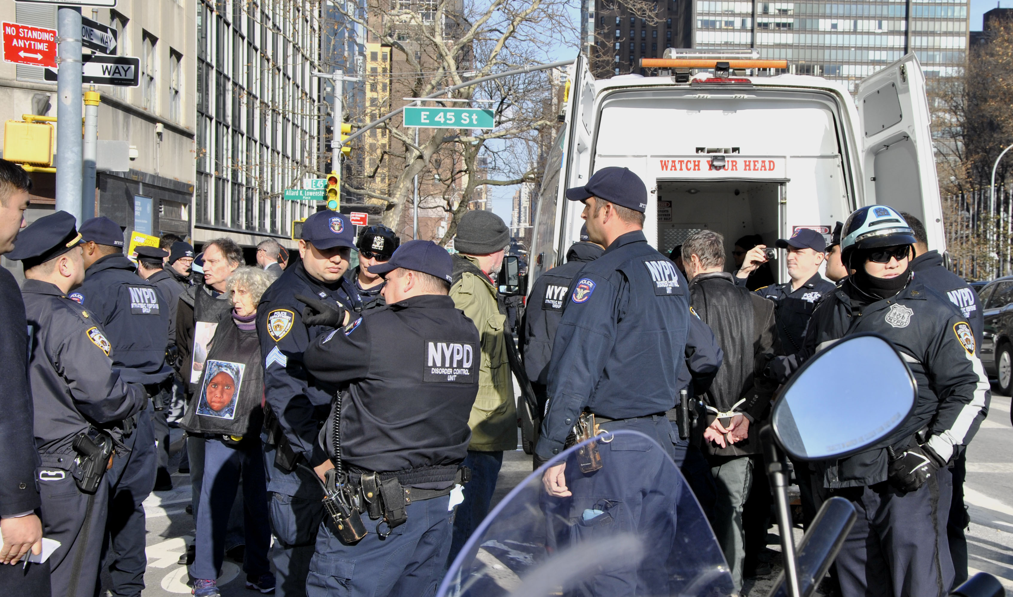 122 Arrests